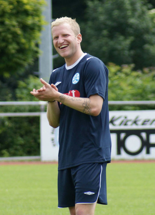 Oliver Stierle 2010 beim Training der Stuttgarter Kickers